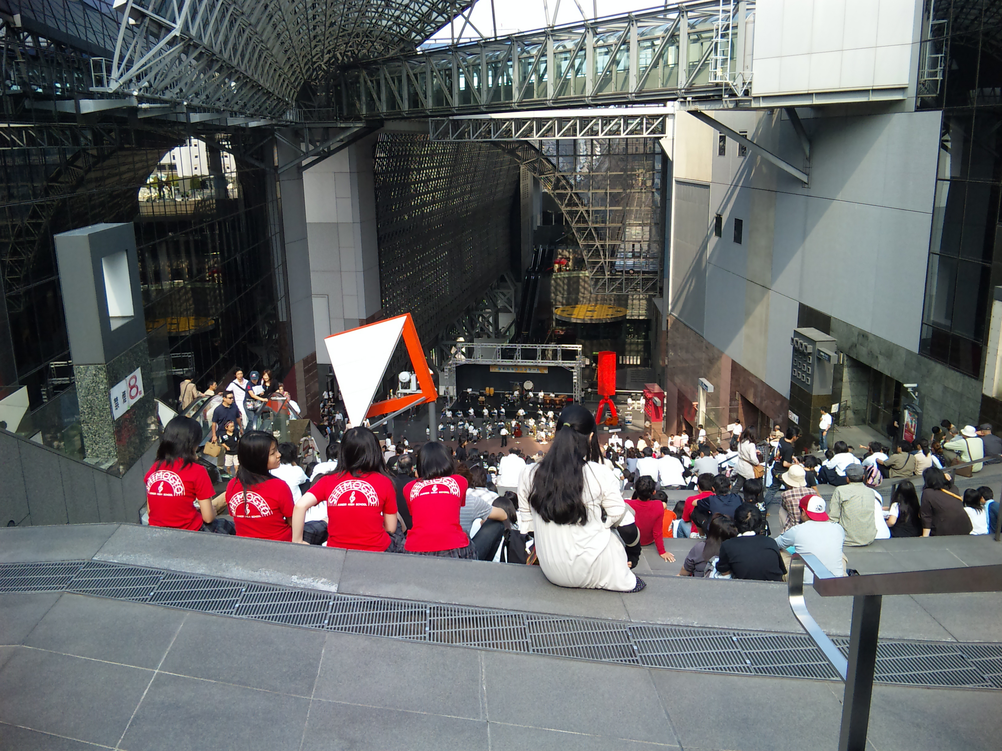 京都駅大階段